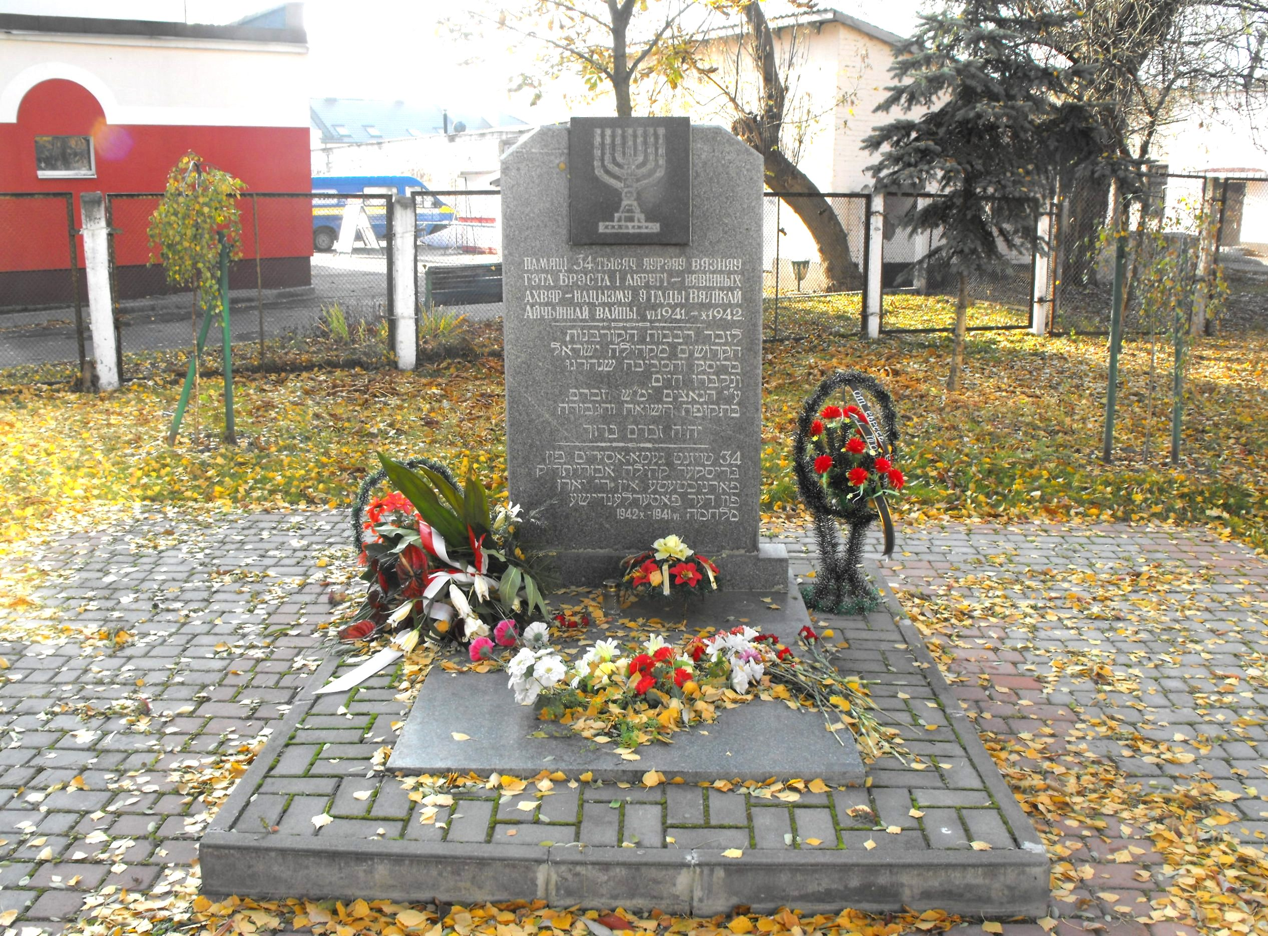 Мемориальный камень в память 34 000 евреев - жителей Бреста и близлежащих населённых пунктов, убитых нацистами в 1941-1942 гг. Установлен на ул. Куйбышева - ранее ул. Длинная (Dluga), находившейся в центре Брестского гетто. Поблизости от этого мемориала немцы неоднократно проводили массовые убийства евреев.